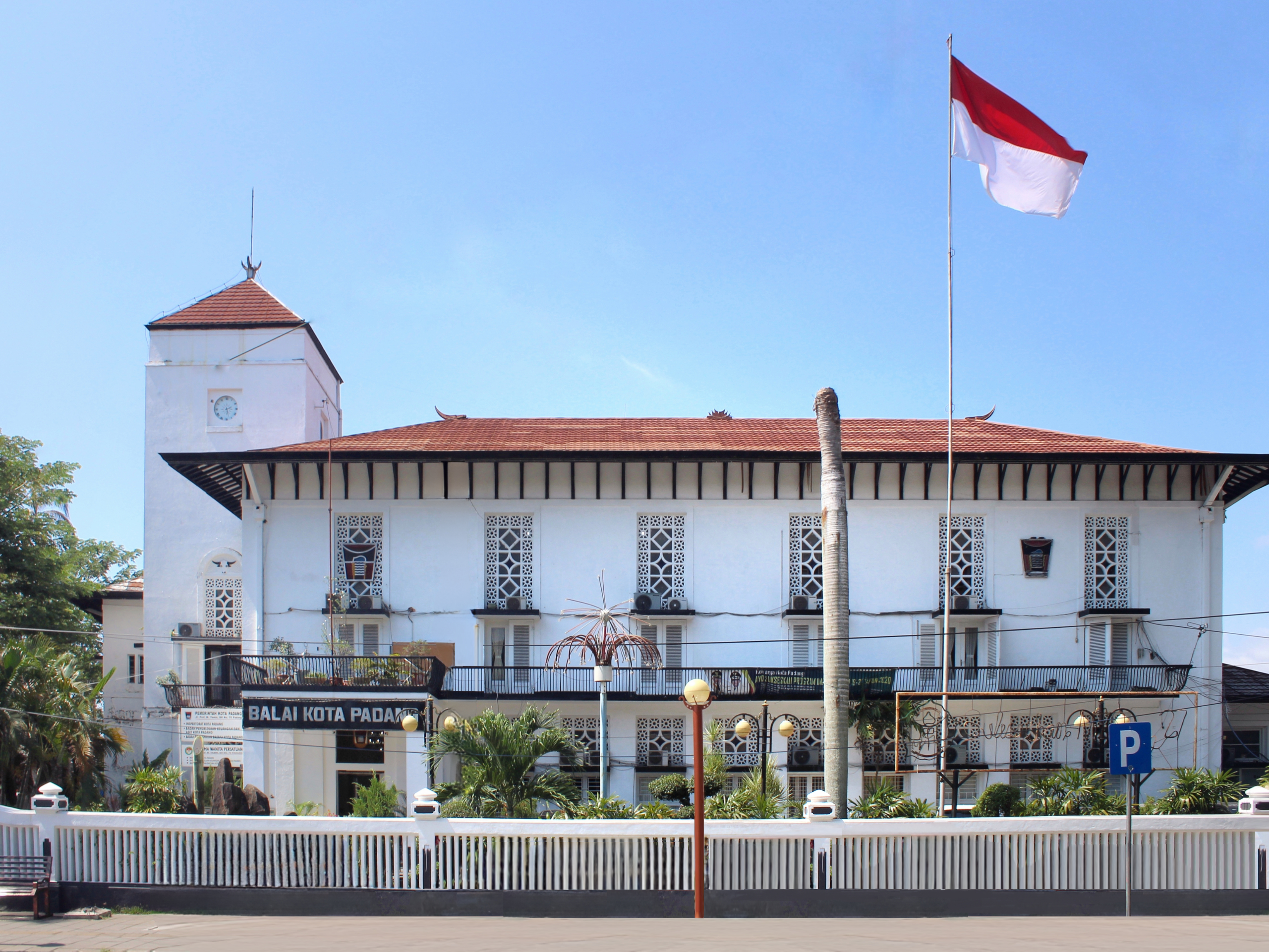 Balai Kota Padang Lama